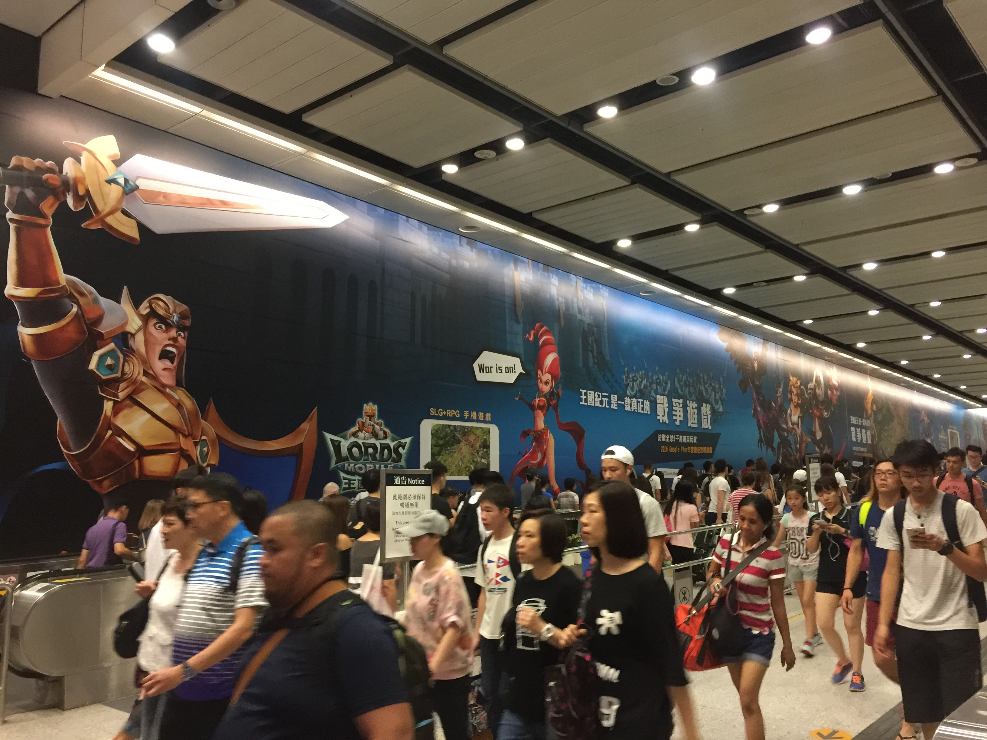 Lords Mobile advertisement in Hong Kong subway